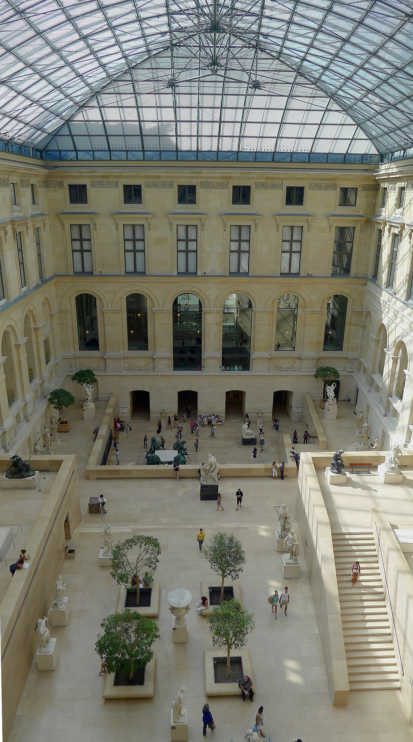 View toward the west of the Cour Puget (Palais du Louvre, Paris)